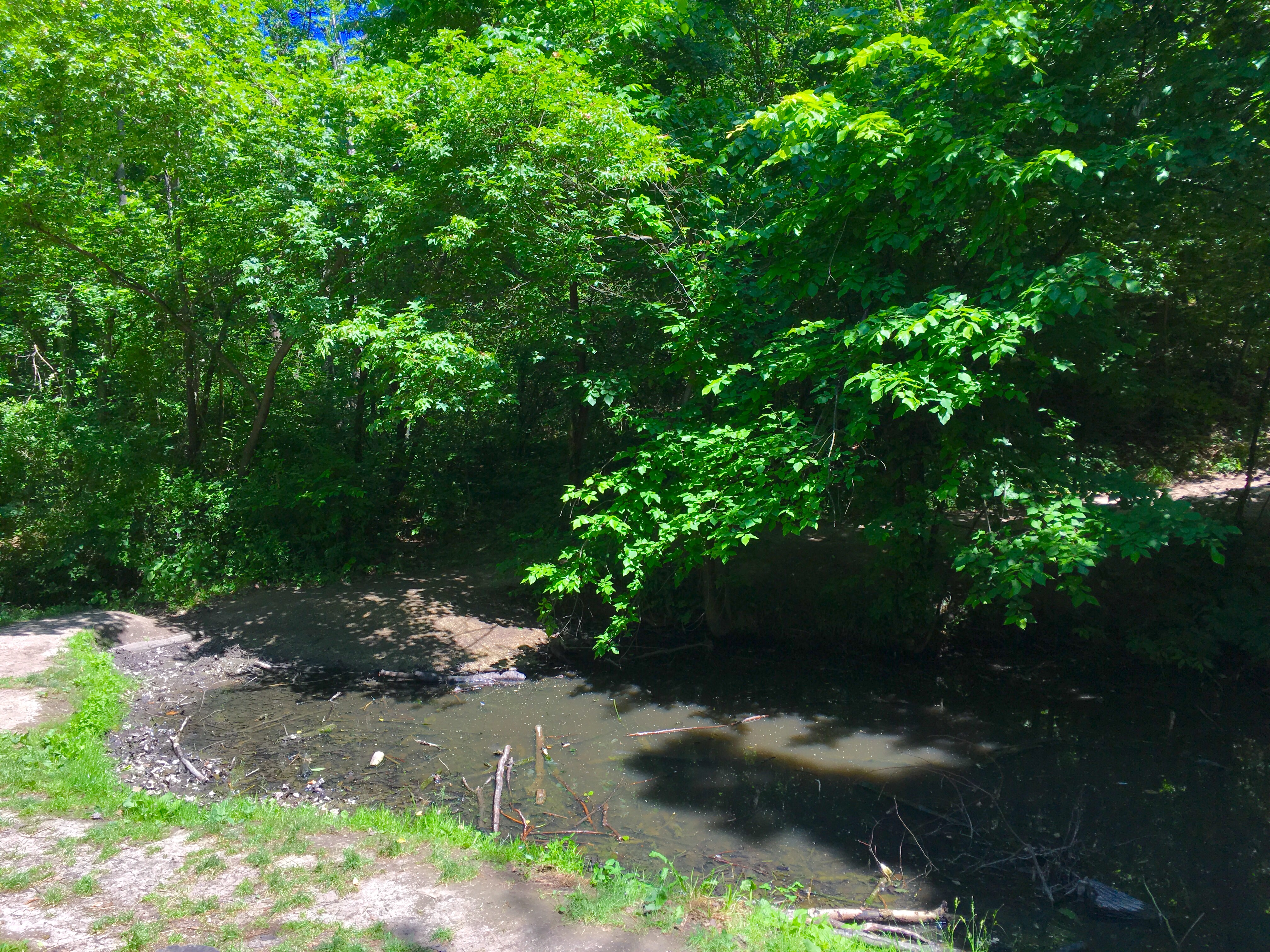 A Béka-tó 2017 júniusában.